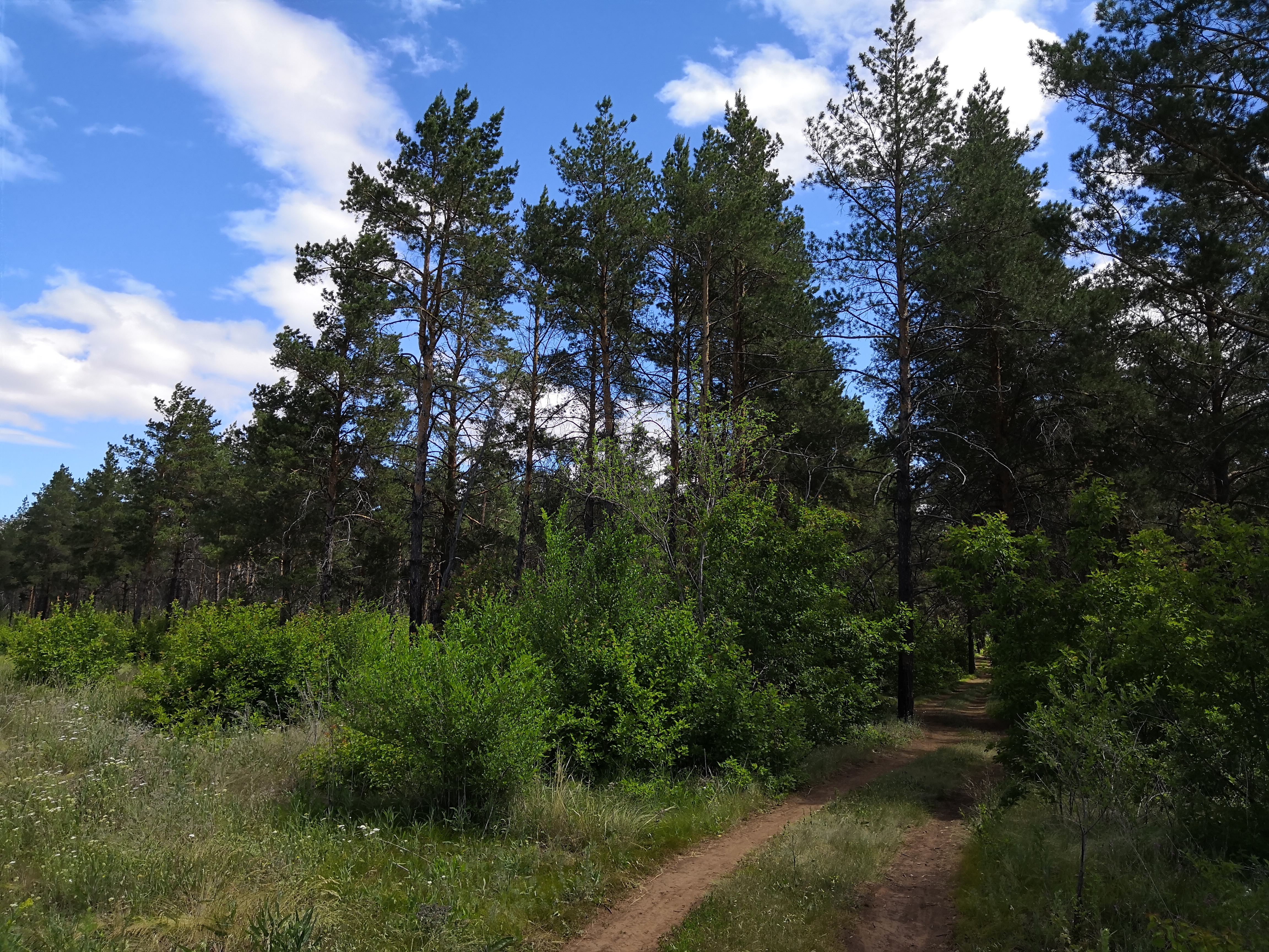 Качкарский парк